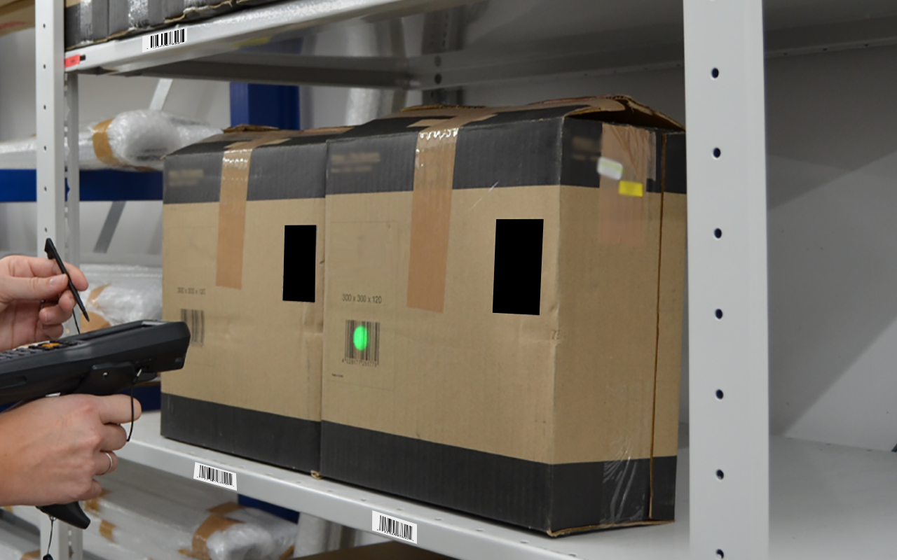 Mit einem Barcode-Scanner werden Lagerentnahmen quittiert.